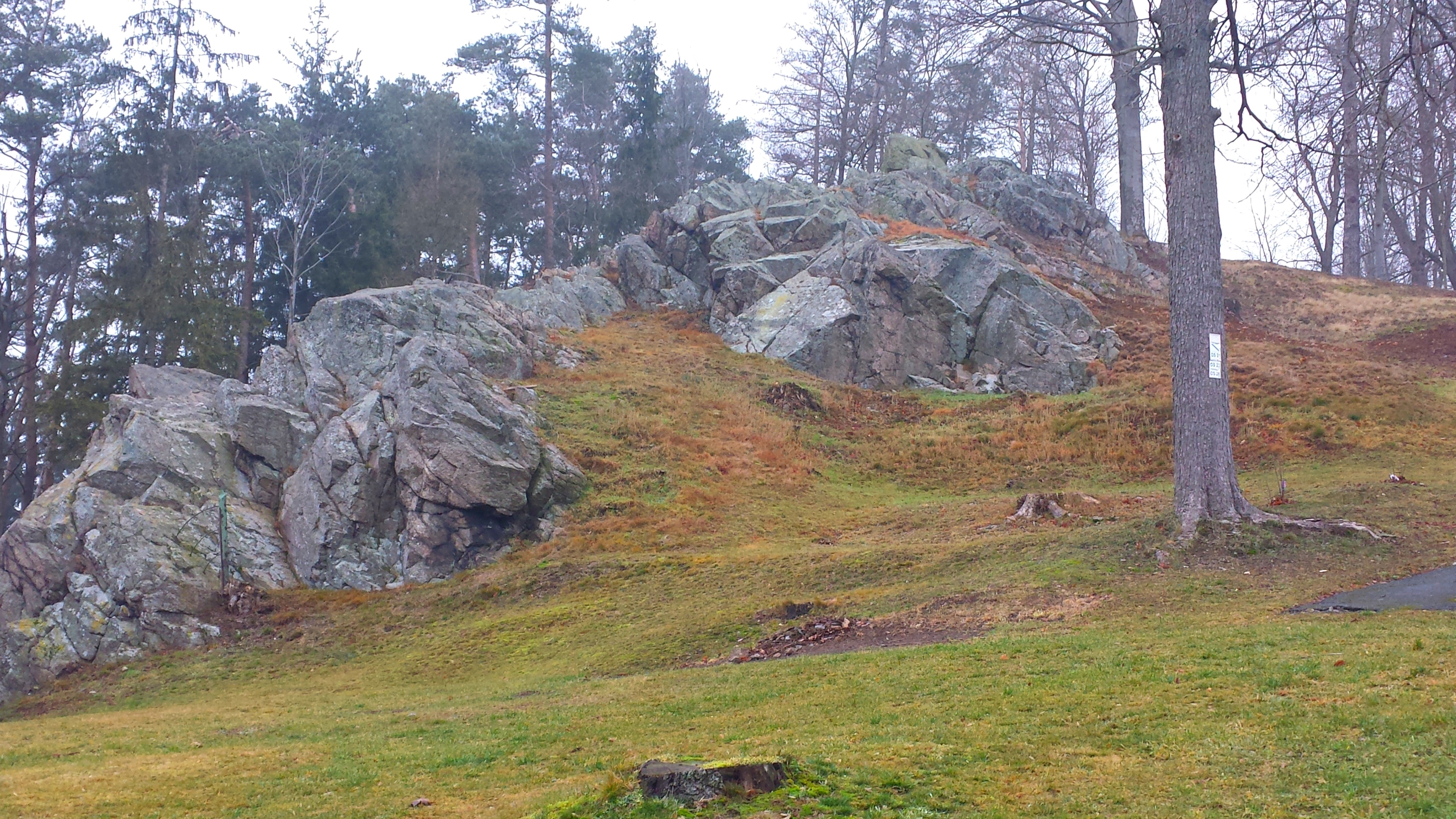 Die Wachende Jungfrau ist ein Felsengebilde im Stadtpark, um die sich alte Geschichten ranken